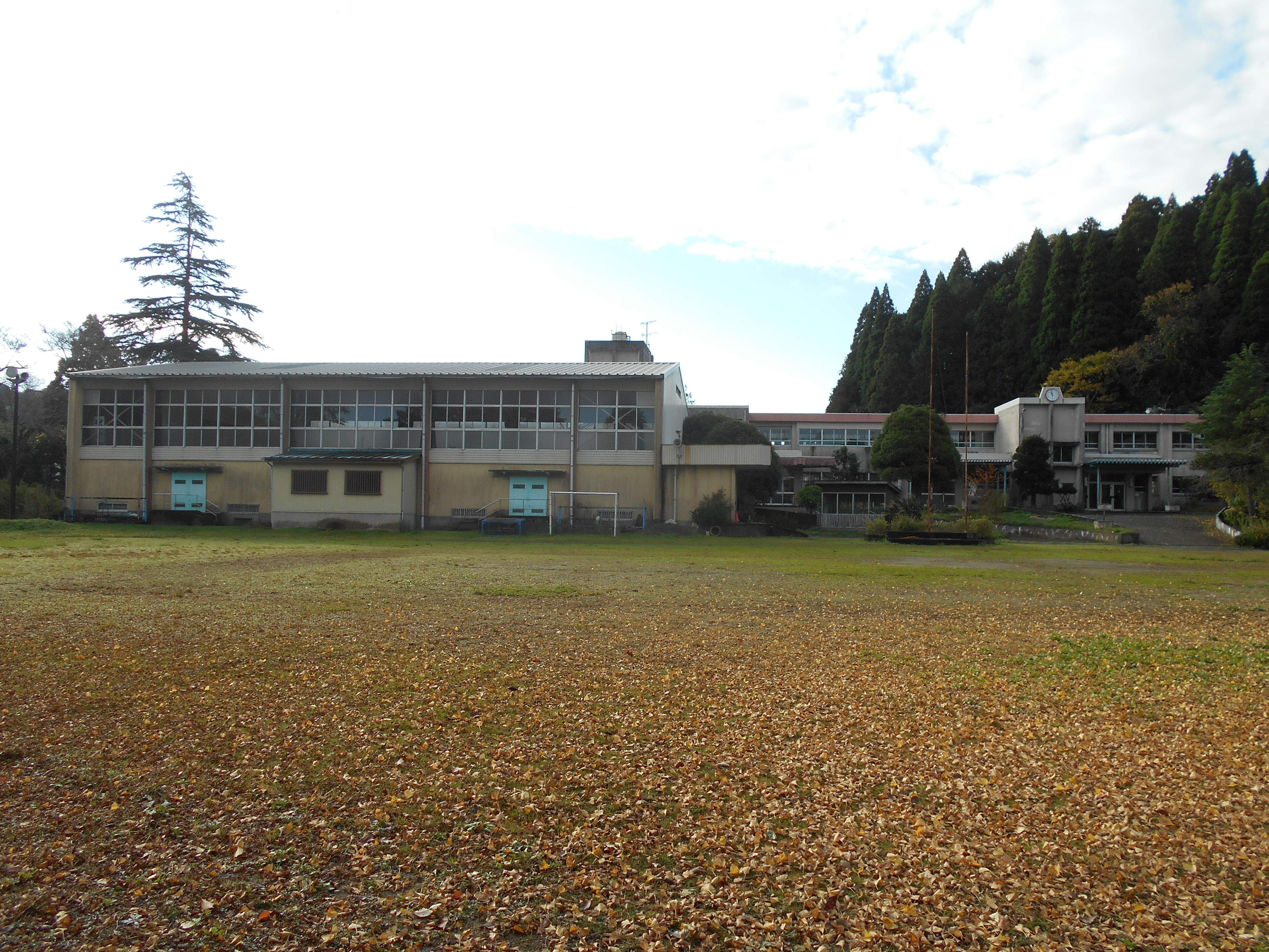 市原市立白鳥小学校